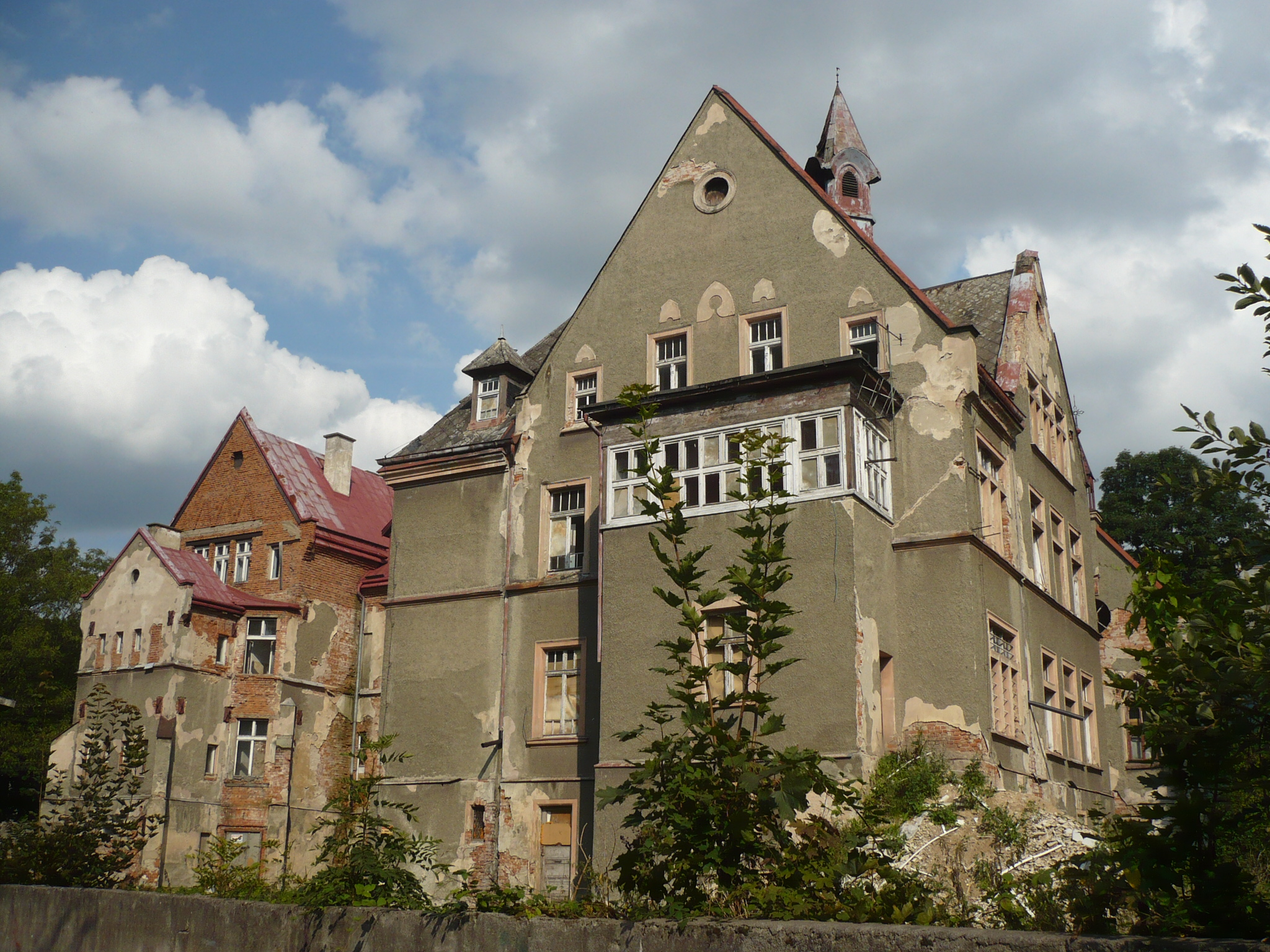 Nowa Ruda. ul. Marszałka Józefa Piłsudskiego 16 - szpital miejski, 1879, 1908, 1912